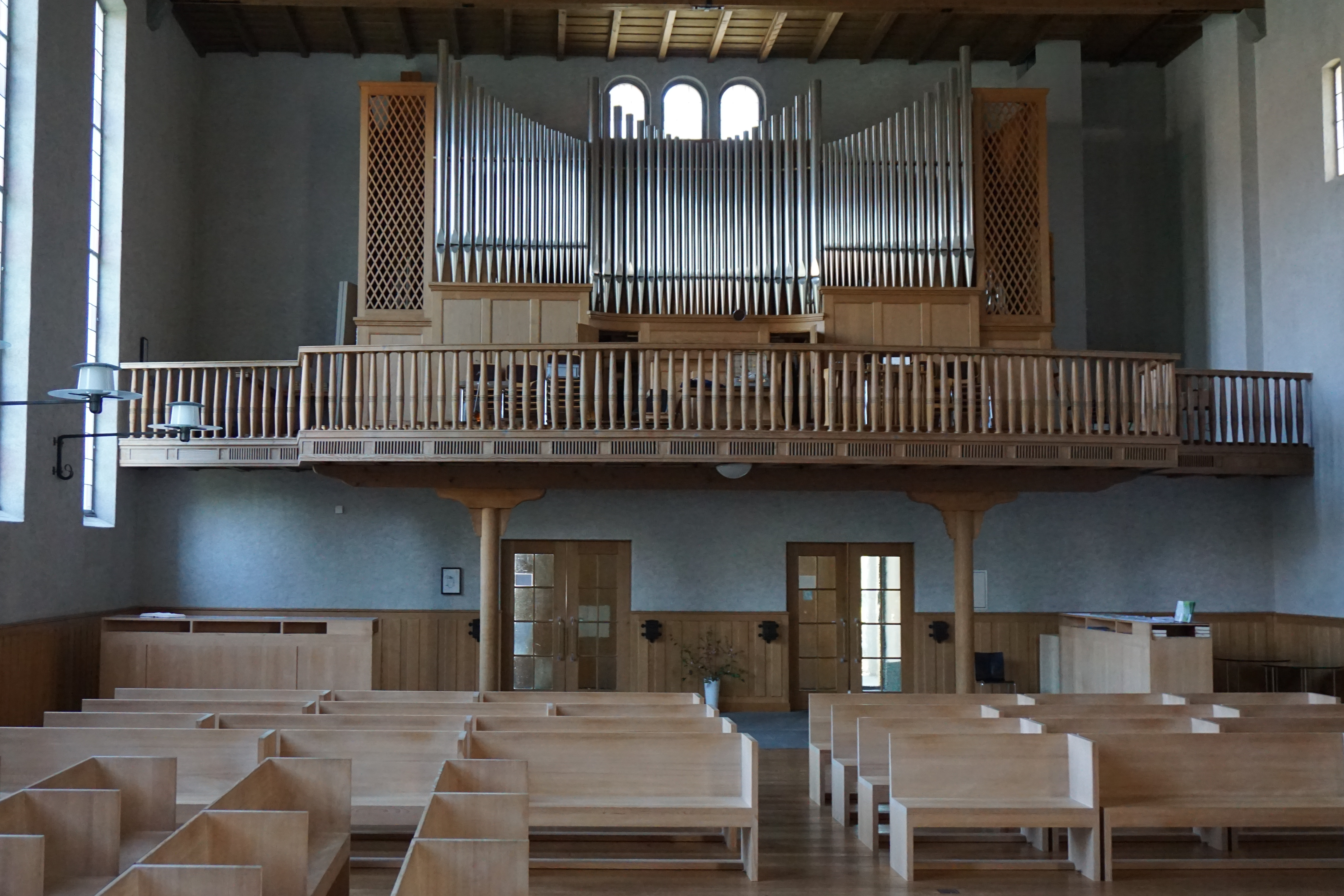 Kirche Wabern, Empore und Grosse Orgel